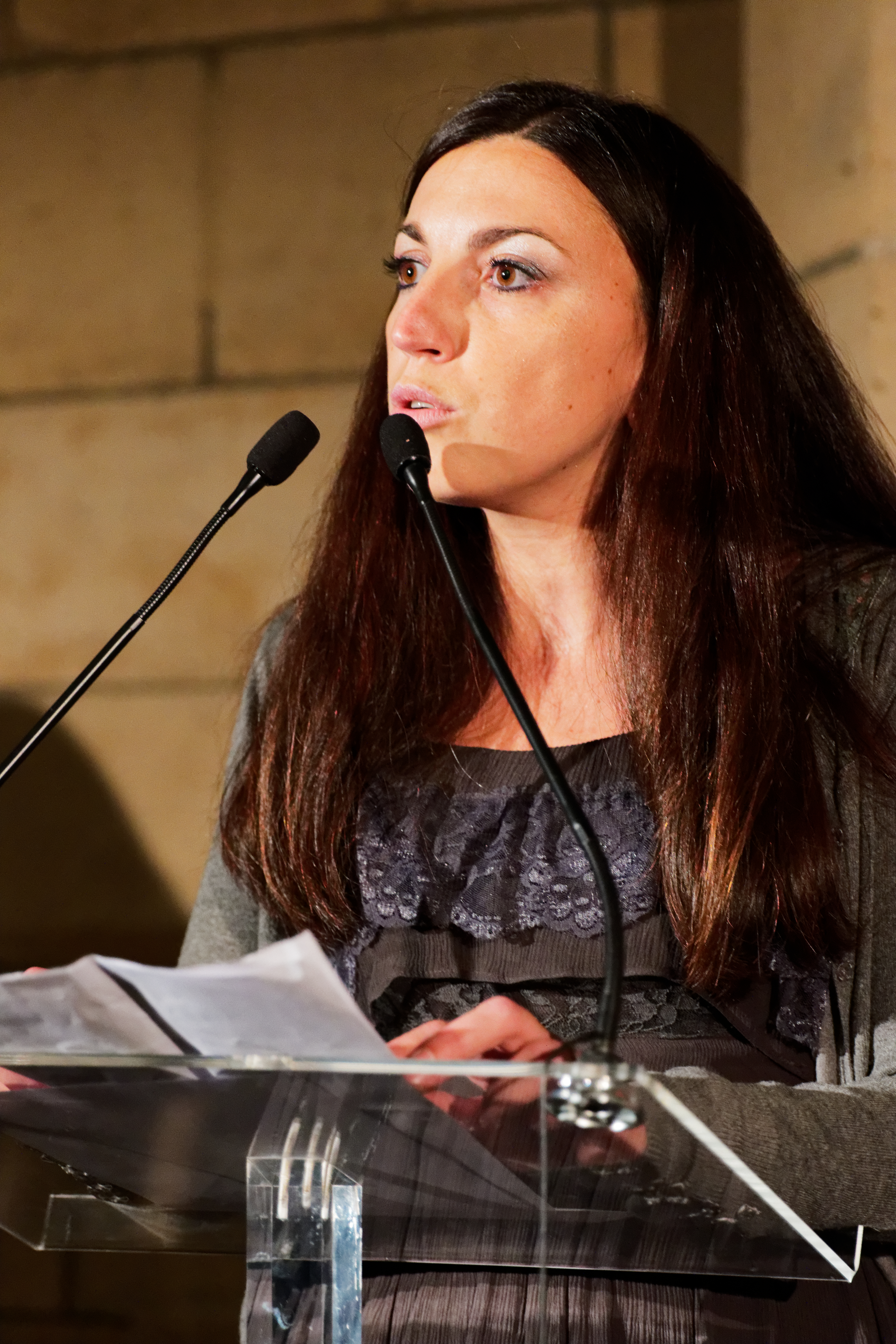 Cérémonie de remise des prix de Wiki Loves Monuments France 2015 à la Conciergerie, Paris.